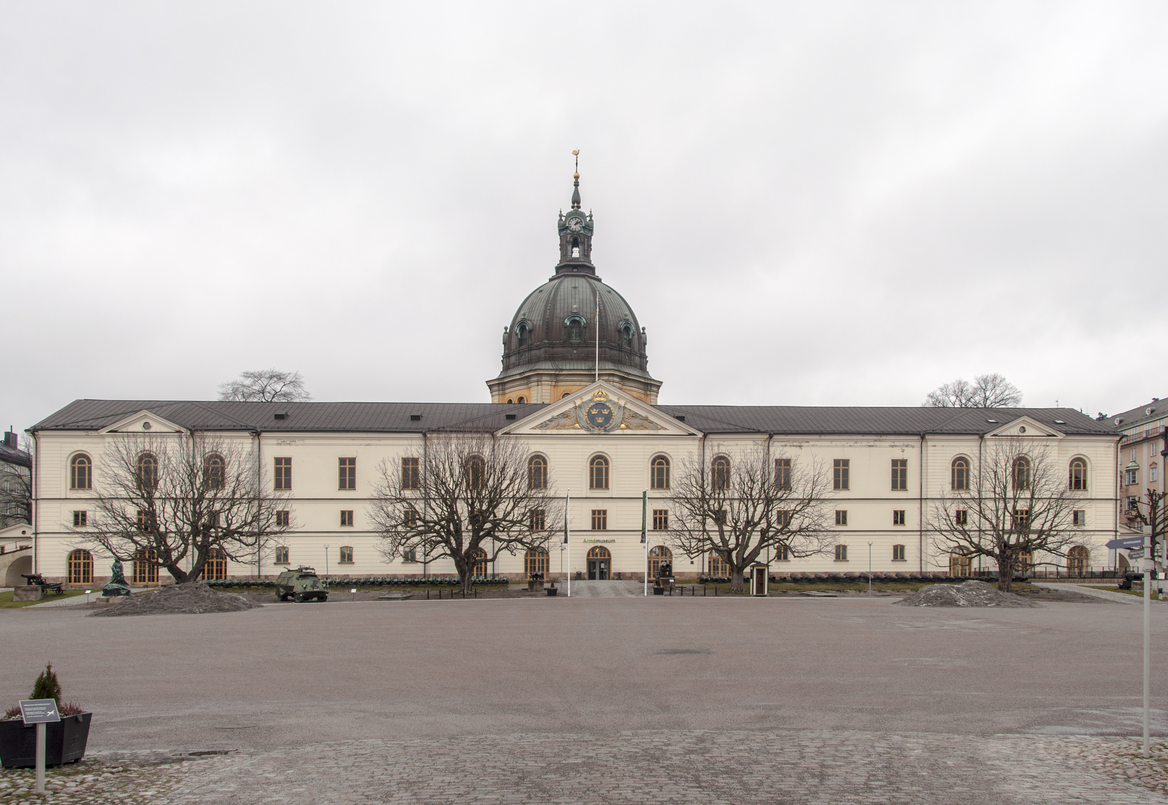 Armémuseum